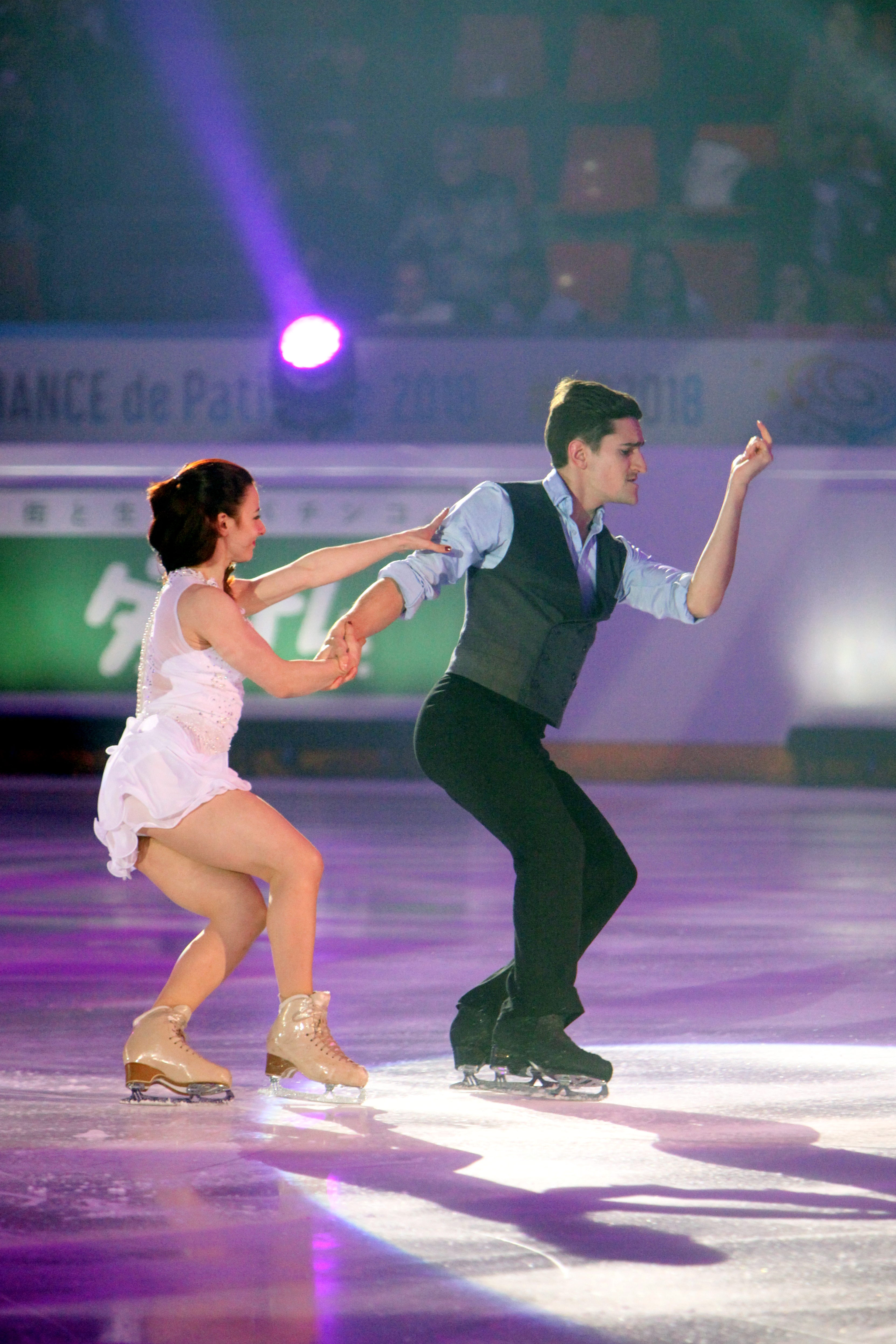 Marie-Jade Lauriault and Romain Le Gac during the gala at the Internationaux de France de Patinage 2018.